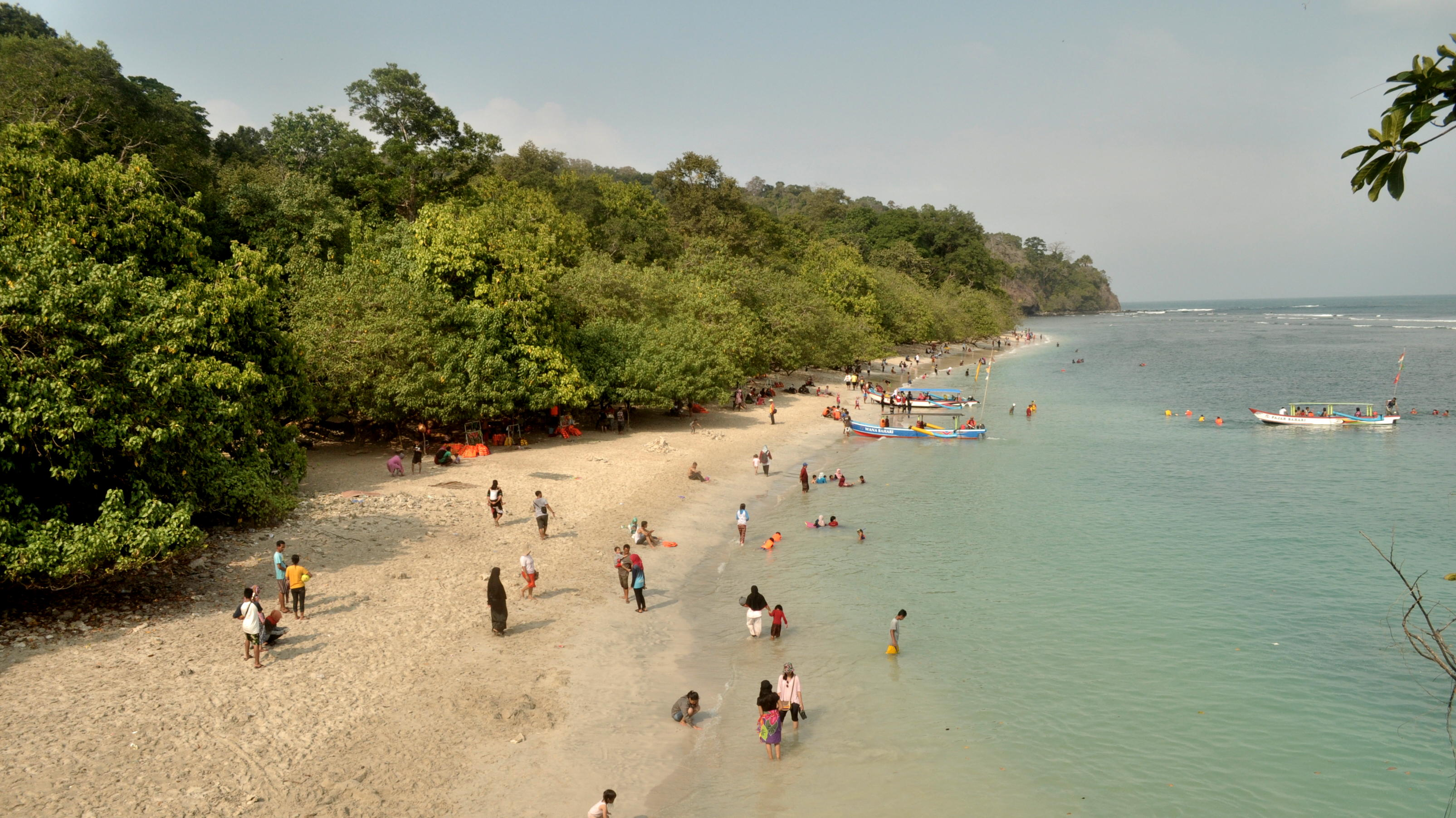 Pasir putih di Pantai Pangandaran